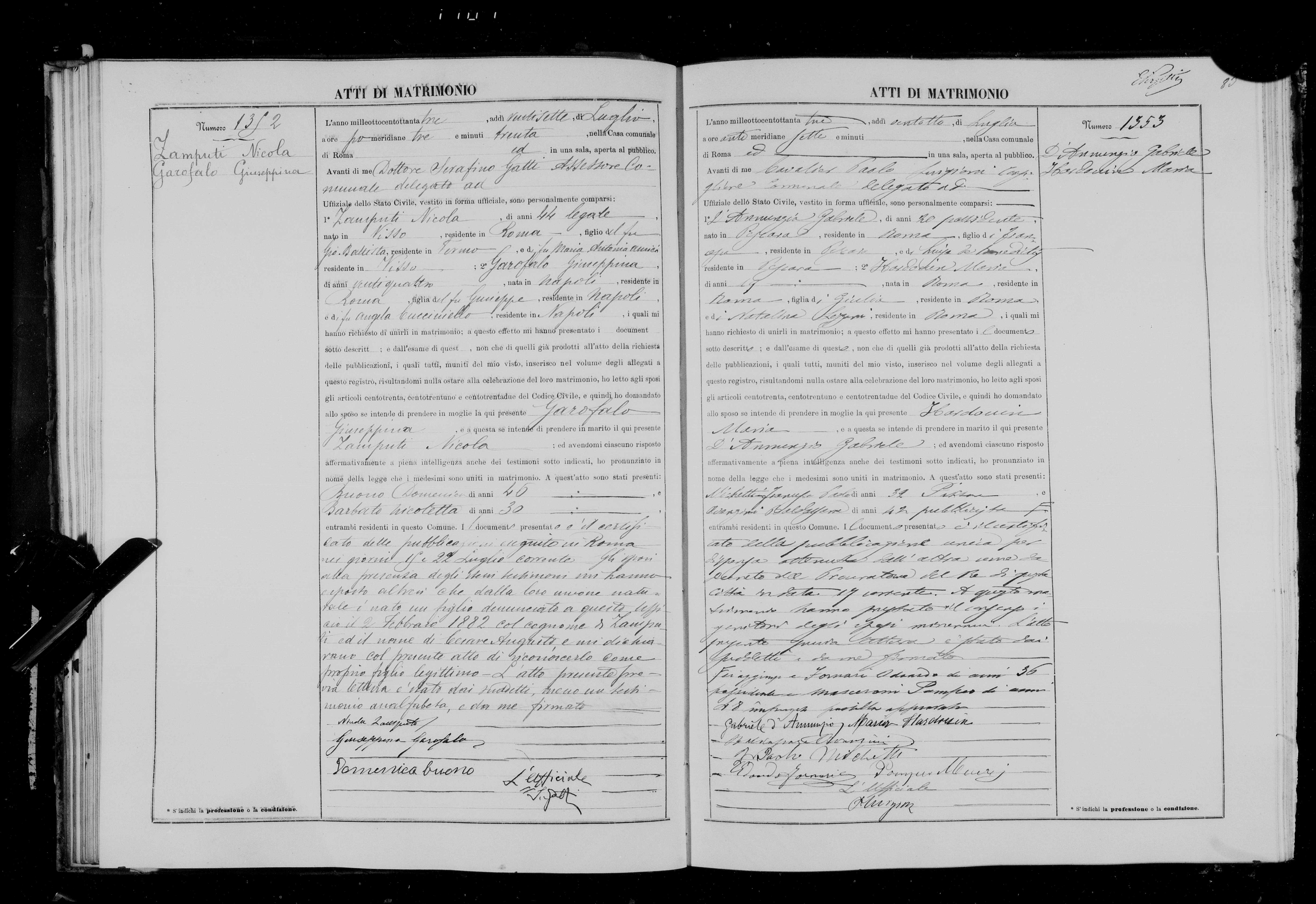 Atto di matrimonio di Gabriele D'Annunzio e Maria Hardouin avvenuto a Roma il 28 luglio 1883 (AS Roma, Fondo stato civile)